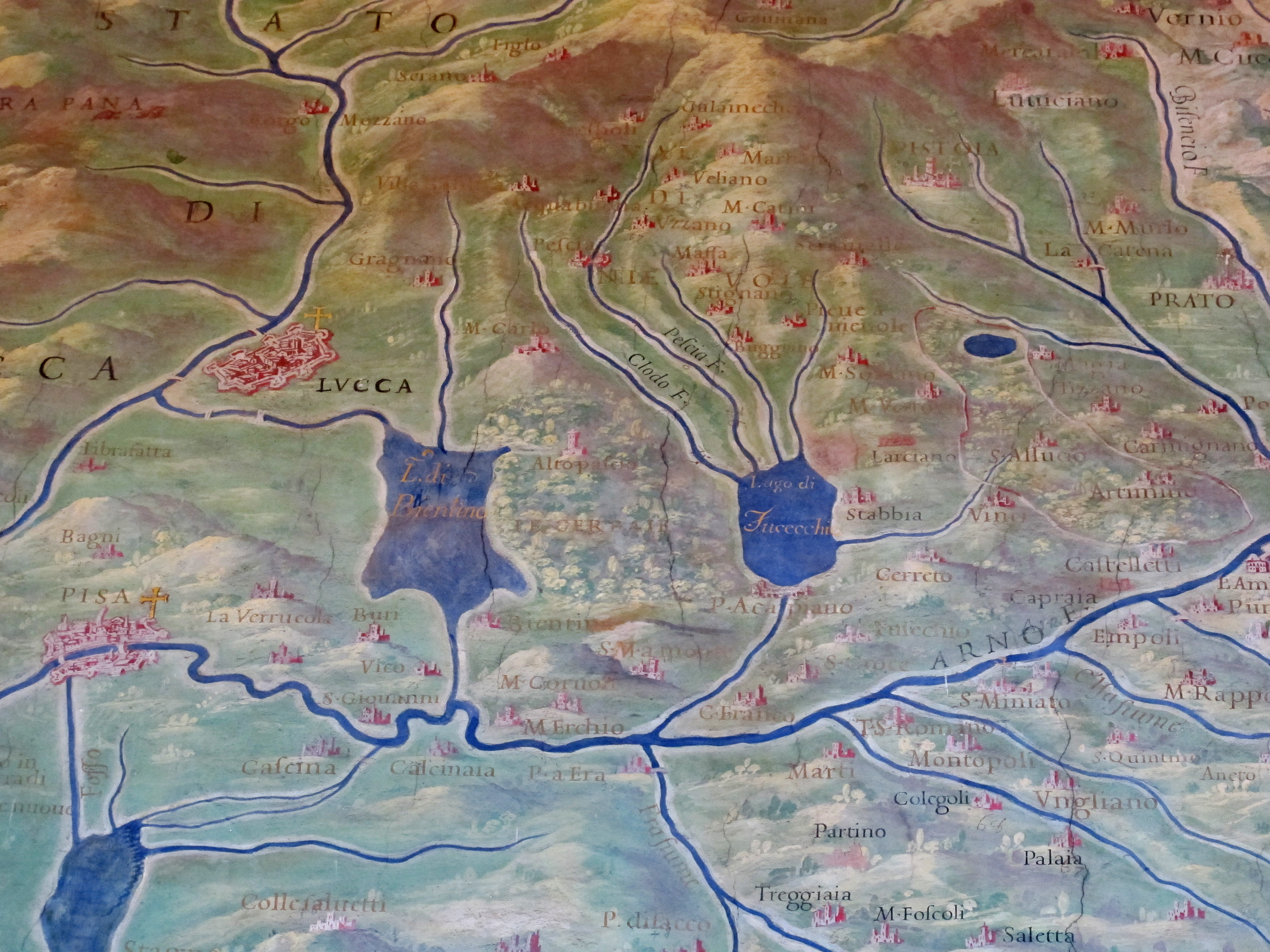 Musei vaticani, palazzo apostolico